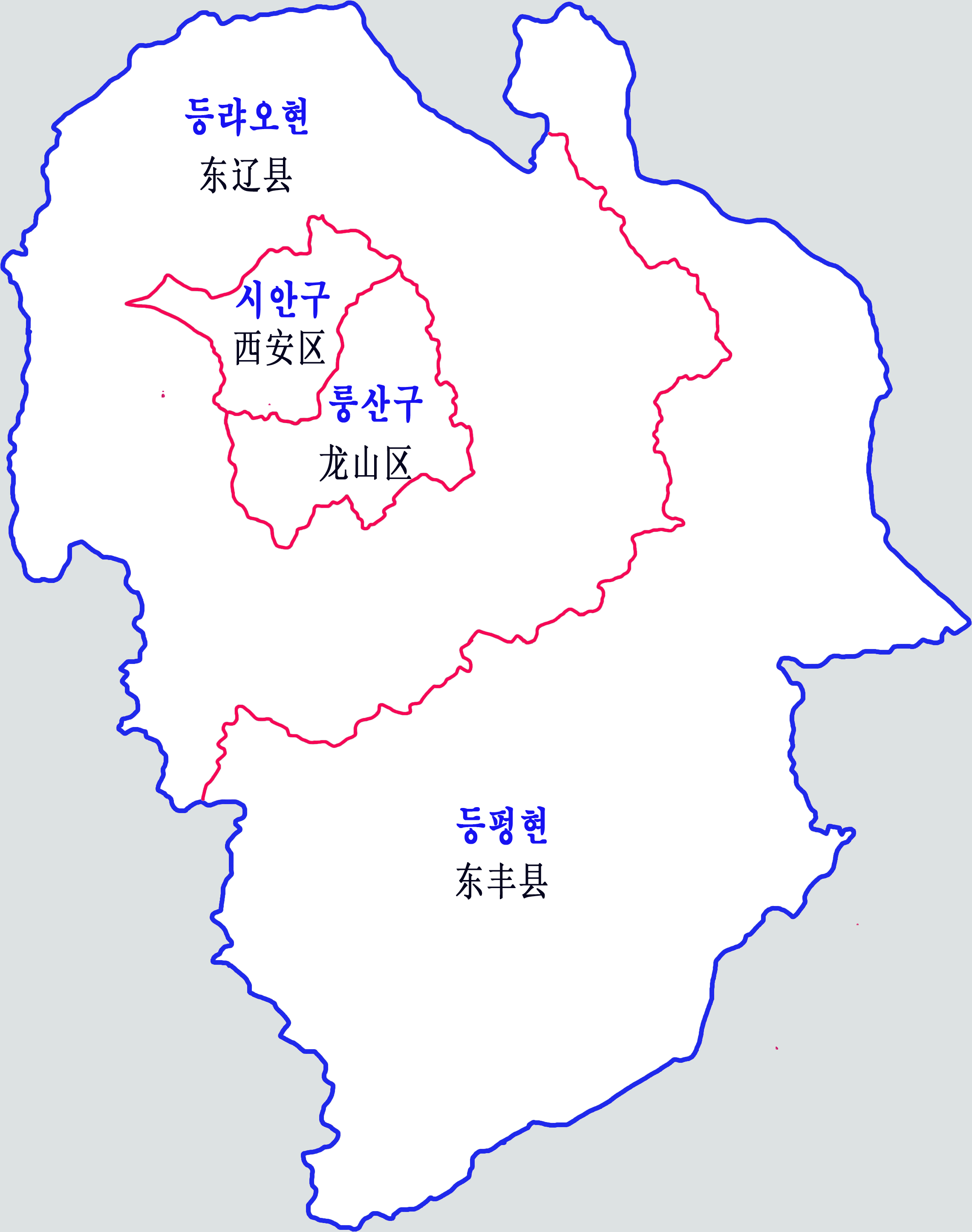 랴오위안지도